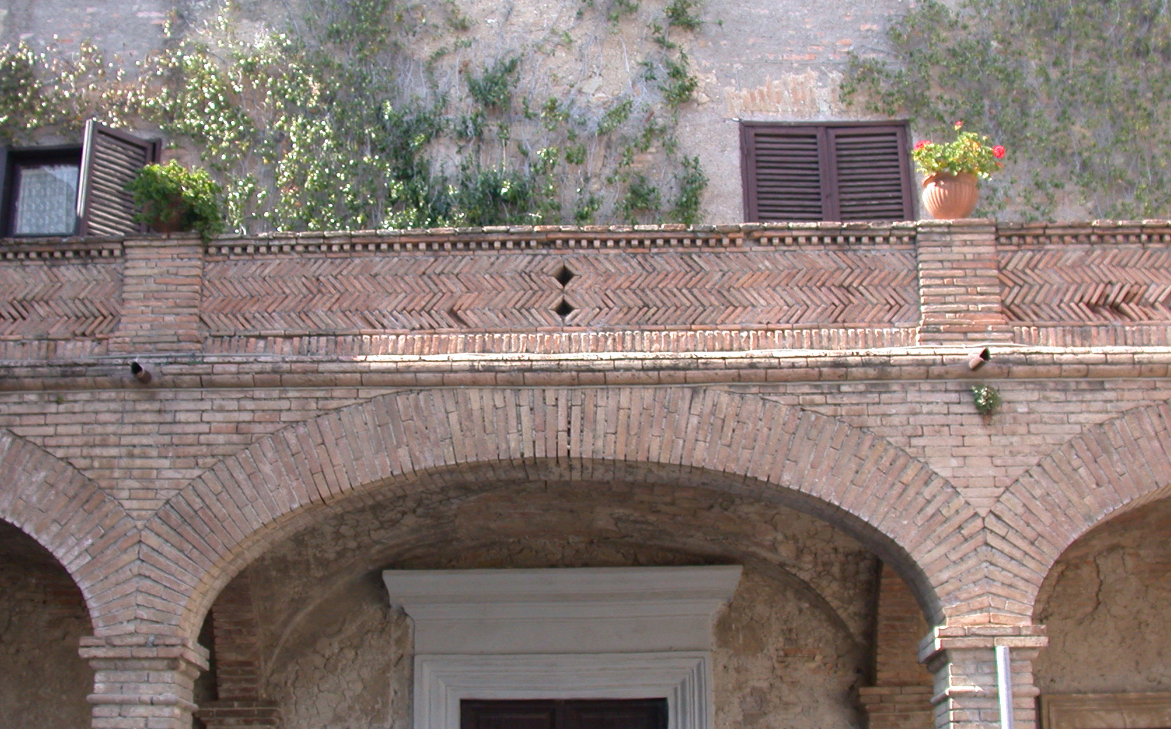 Particolare del porticato in laterizio a Palazzo Barberini a Montelibretti, in provincia di Roma.